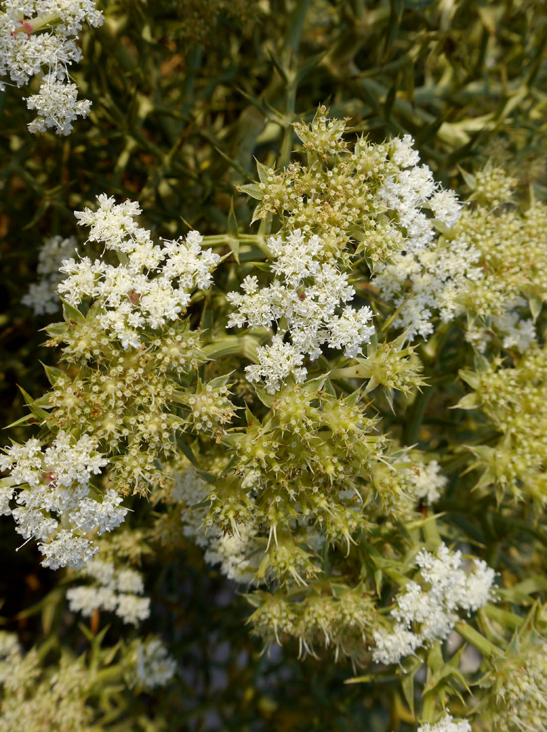 Zahanoria marítima (Echinophora spinosa) en La Manga del Mar Menor (España).